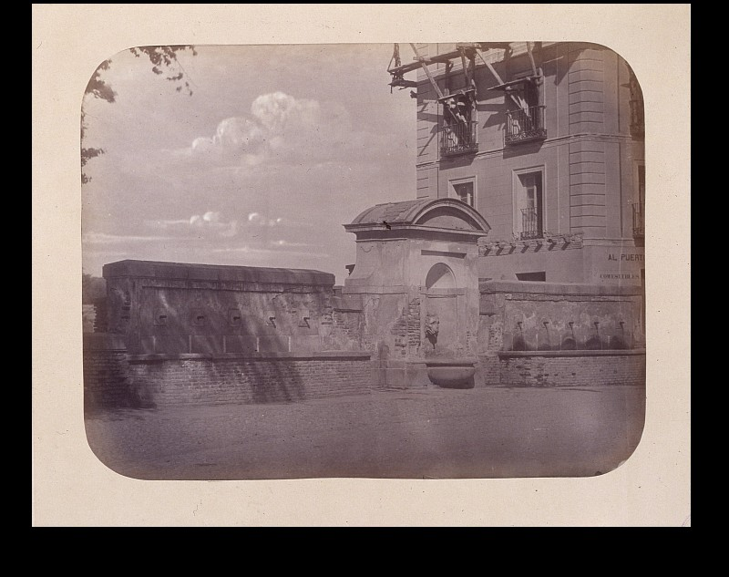 'Fuente de los once caños en San Antonio de la Florida (carretera)'. Obra en 1864 del fotógrafo toledano Alfonso Begué, muerto el 31 de octubre de 1865. Cartulina sepia. Albúmina. 43 x 32 cm. Fotografía contenida en un álbum procedente del Archivo de Villa y trasladado al Museo de Historia en 1983.